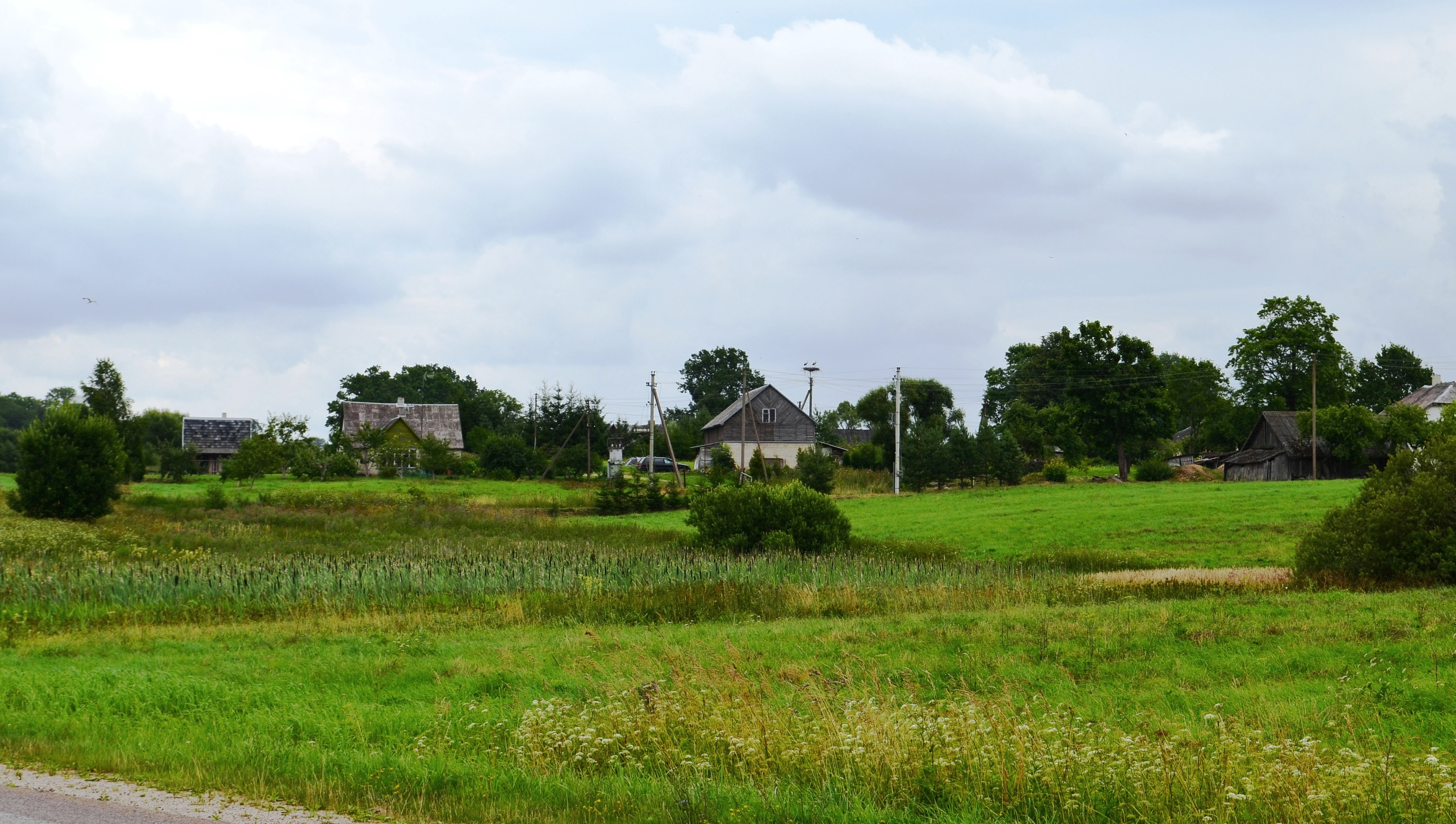 Martyniškiai, Molėtų r.